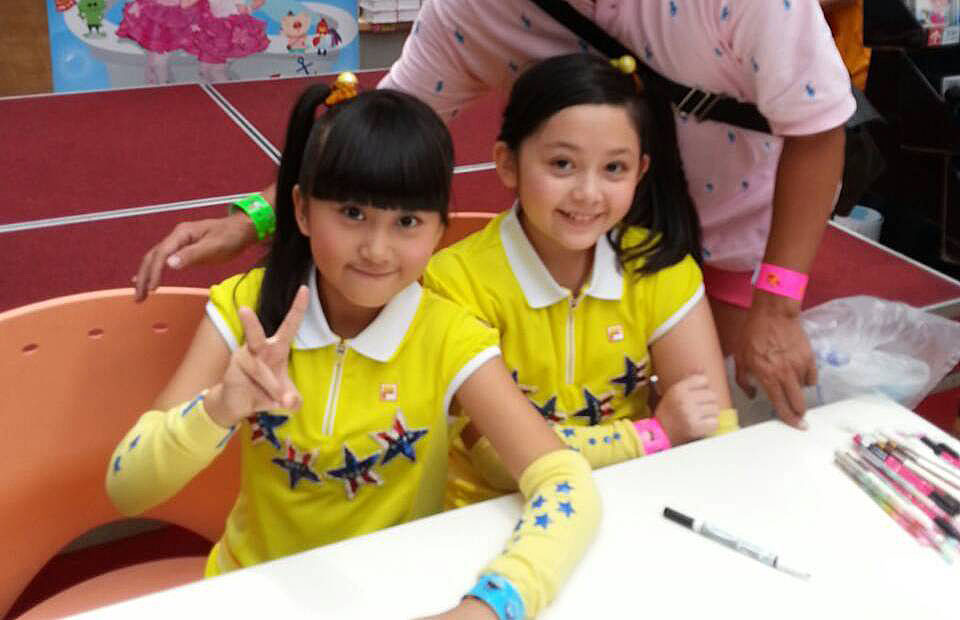 中文（台灣）: 大小姐在台中市家樂福大墩店舉辦專輯《Follow Me》簽唱會。